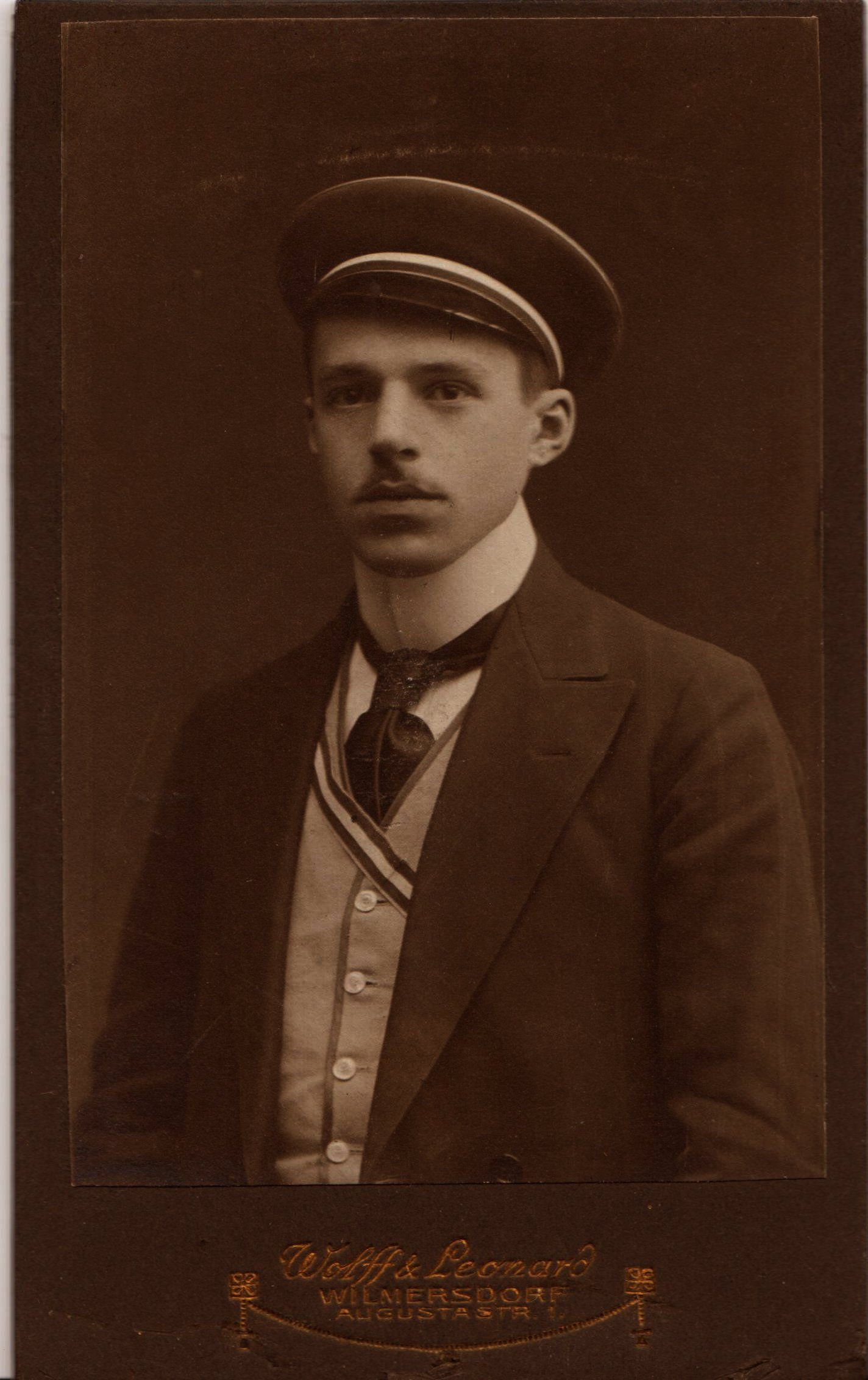 Kurt Oehlmann als Angehöriger des Corps Franconia Berlin im Militärärztlichen Senioren-Convent. Das Bild ist Erich Hippke gewidmet.